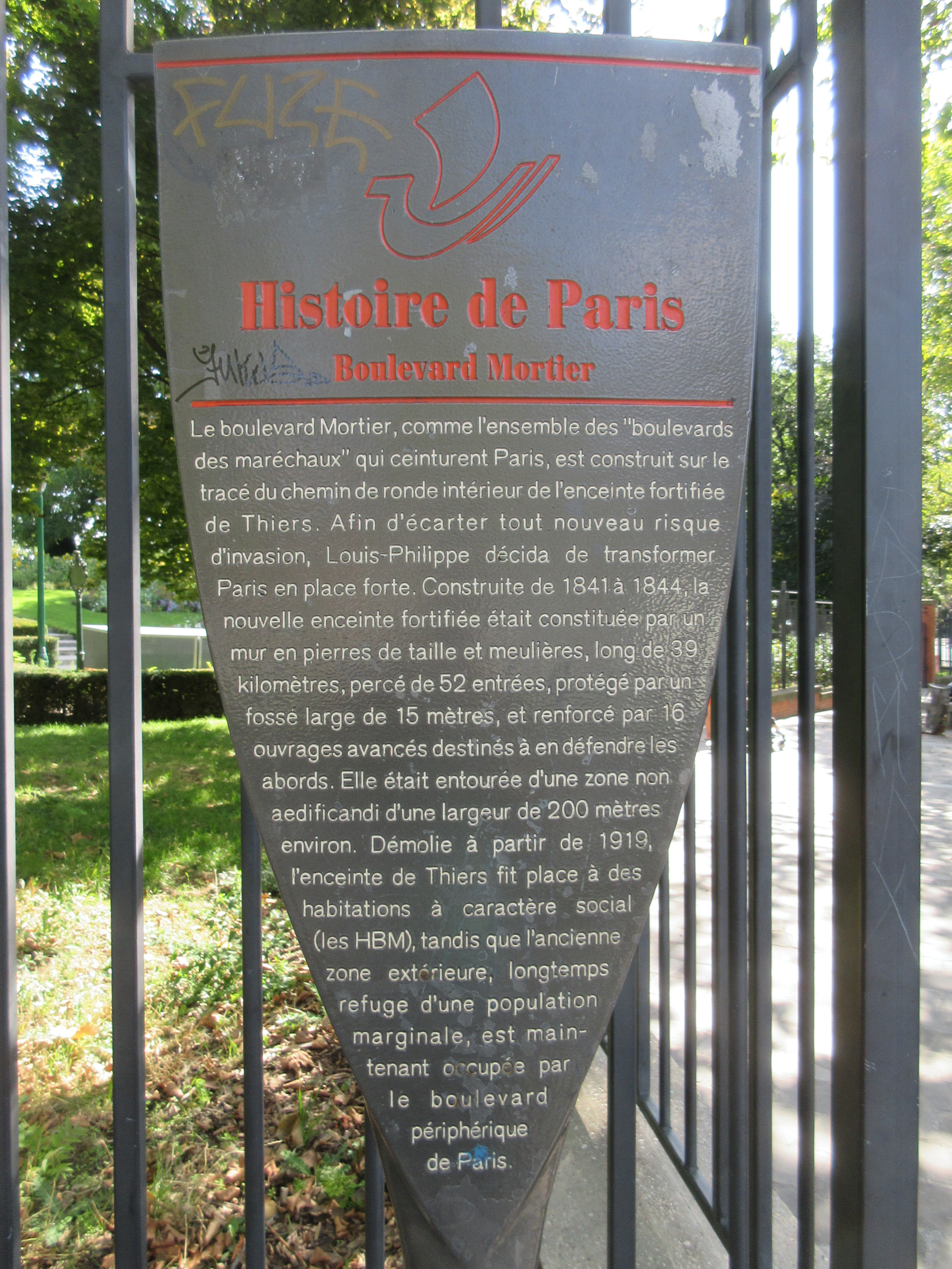 Panneau Histoire de Paris